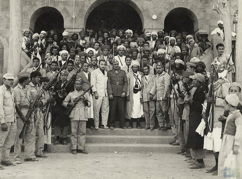 صورة بعد قيام ثورة 26 سبتمبر يظهر فيها الرئيس السلال والدكتور البيضاني مع امين نعمان وسنان ابو لحوم وعبدالله الضبي ومحمد